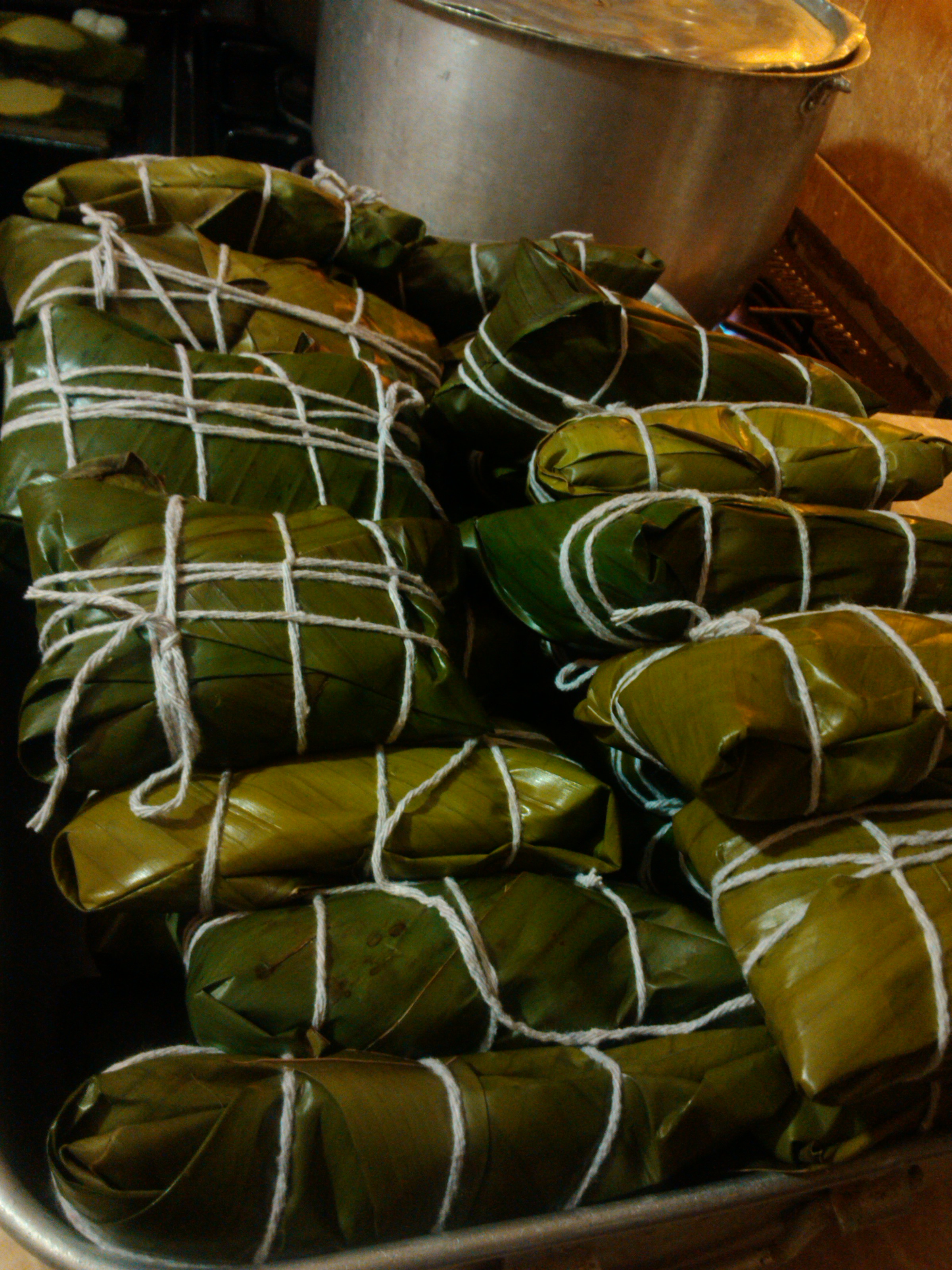 Cena típica navideña